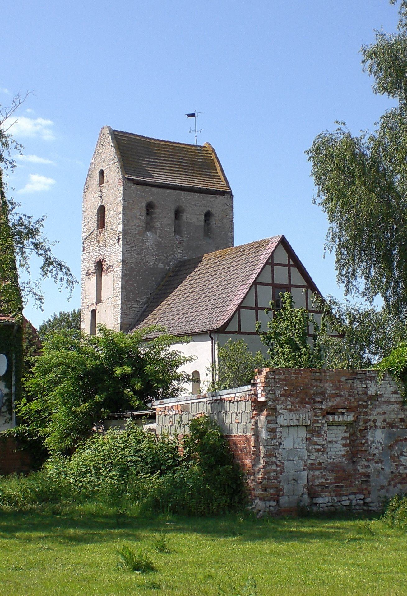 Dorkirche in Döben bei Gnadau